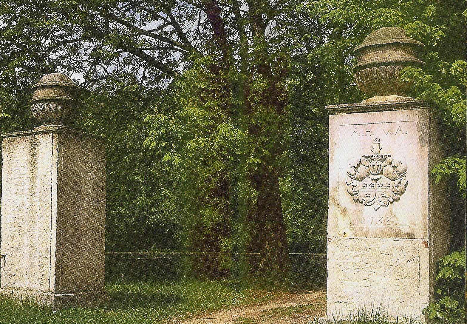 Gut Zichtau Tor